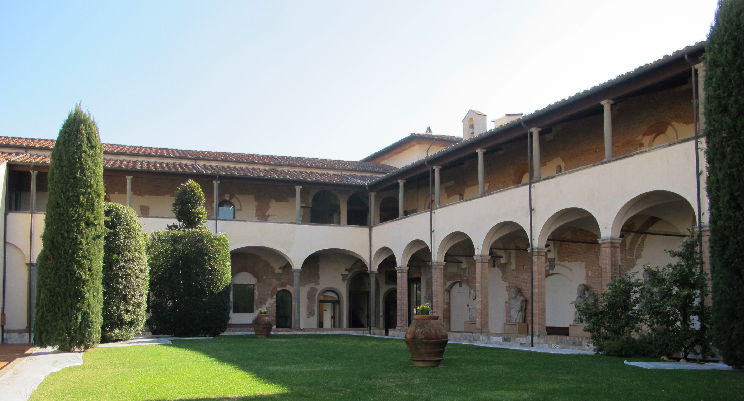 Cortile dell'opera del duomo